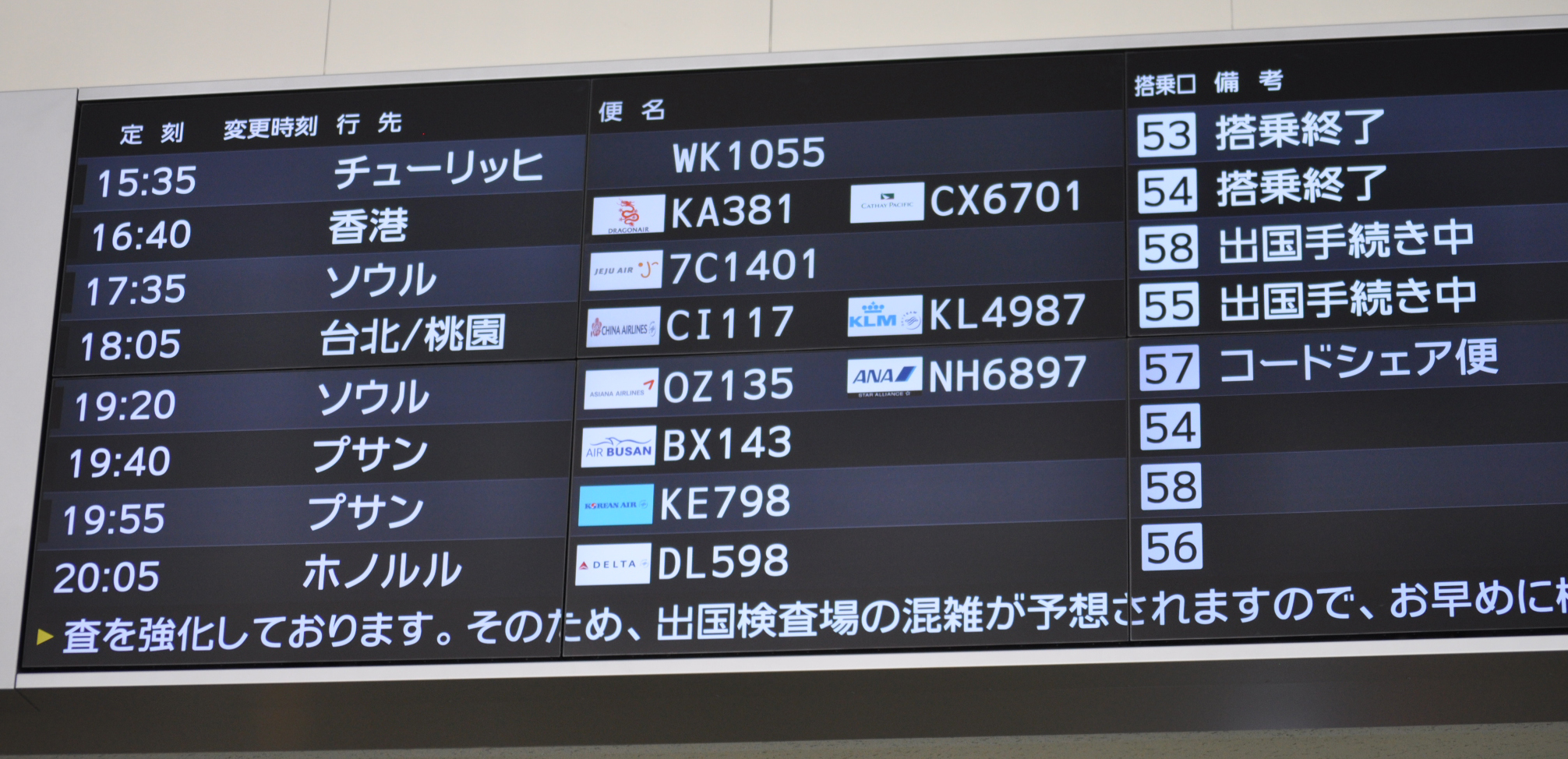 コードシェア便の案内表示。福岡空港にて撮影。